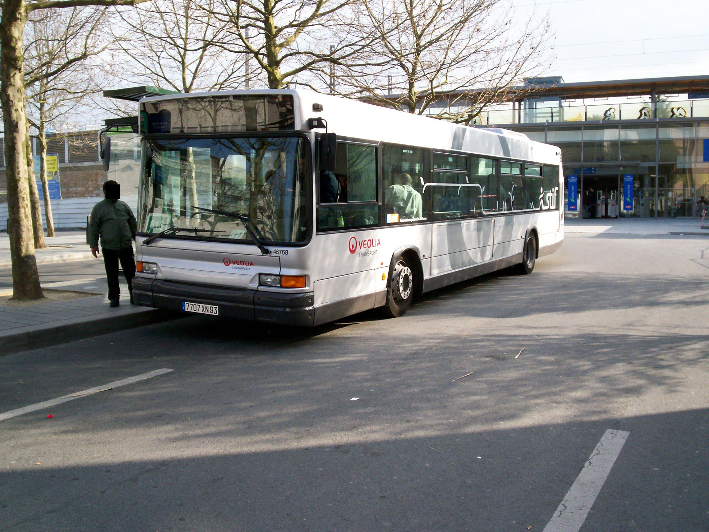 Bus GX317 en nouvelle livrée Veolia Transport - STIF à la gare de chelles